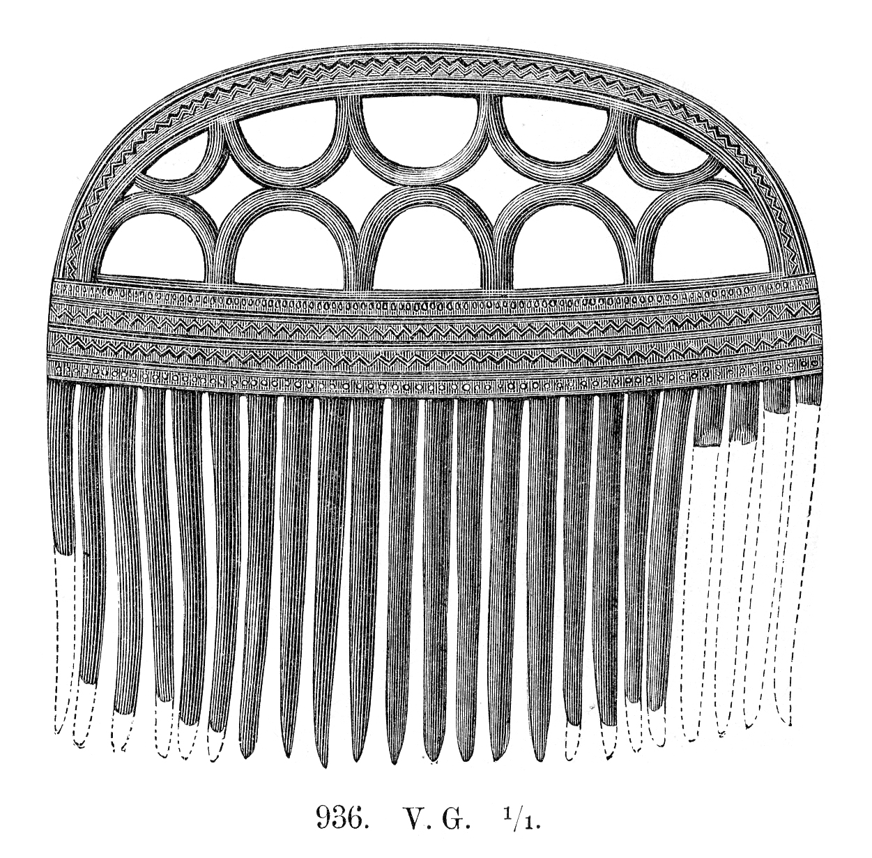 Bronskam från Hasslekärr, Hångsdala socken, Vartofta härad, Tidaholms kommun, f.d. Skaraborgs län, Västergötland, Västra Götalands län, Sverige.